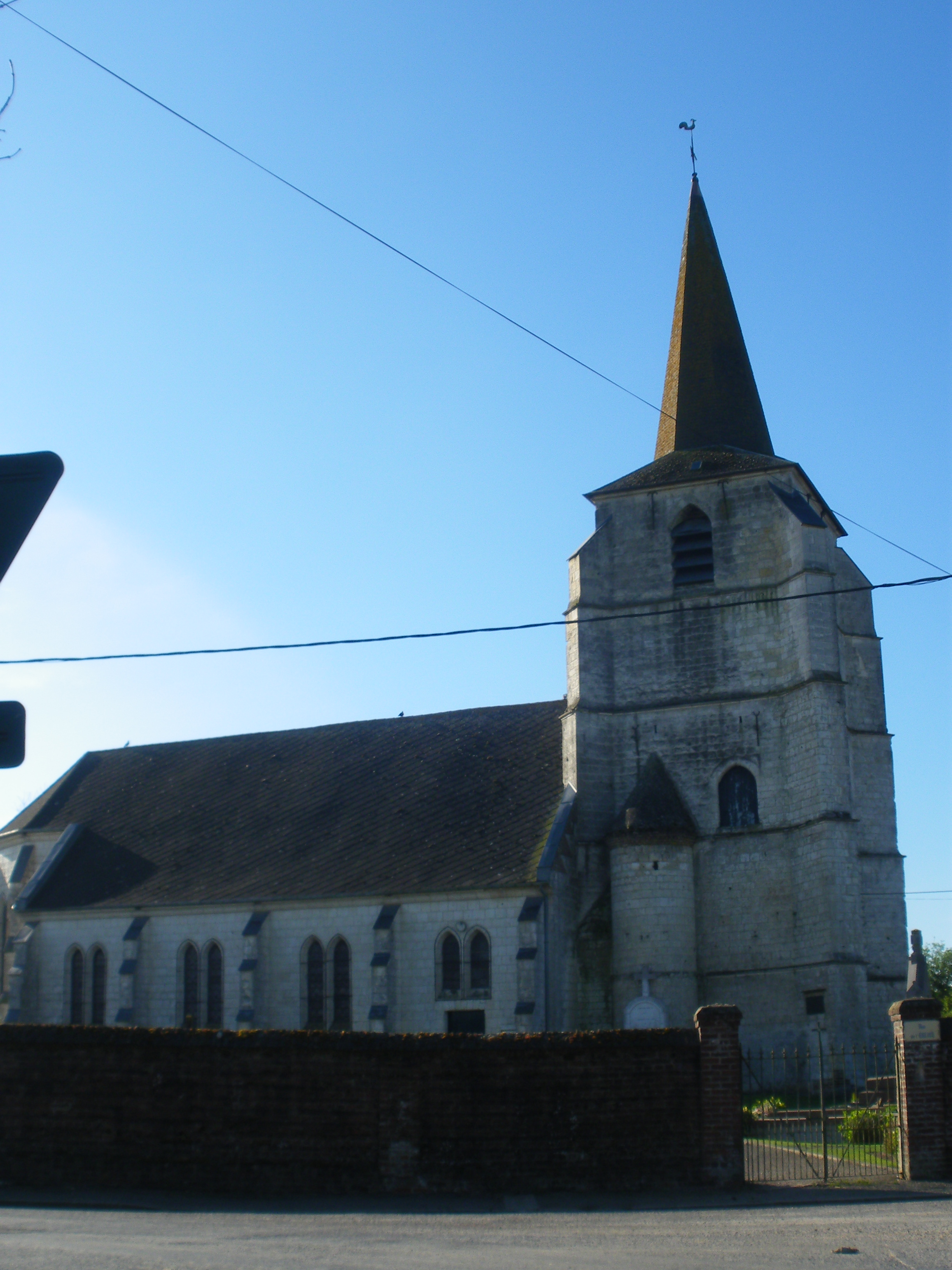 Vue de l'église Saint-Nicolas de Gaudiempré.